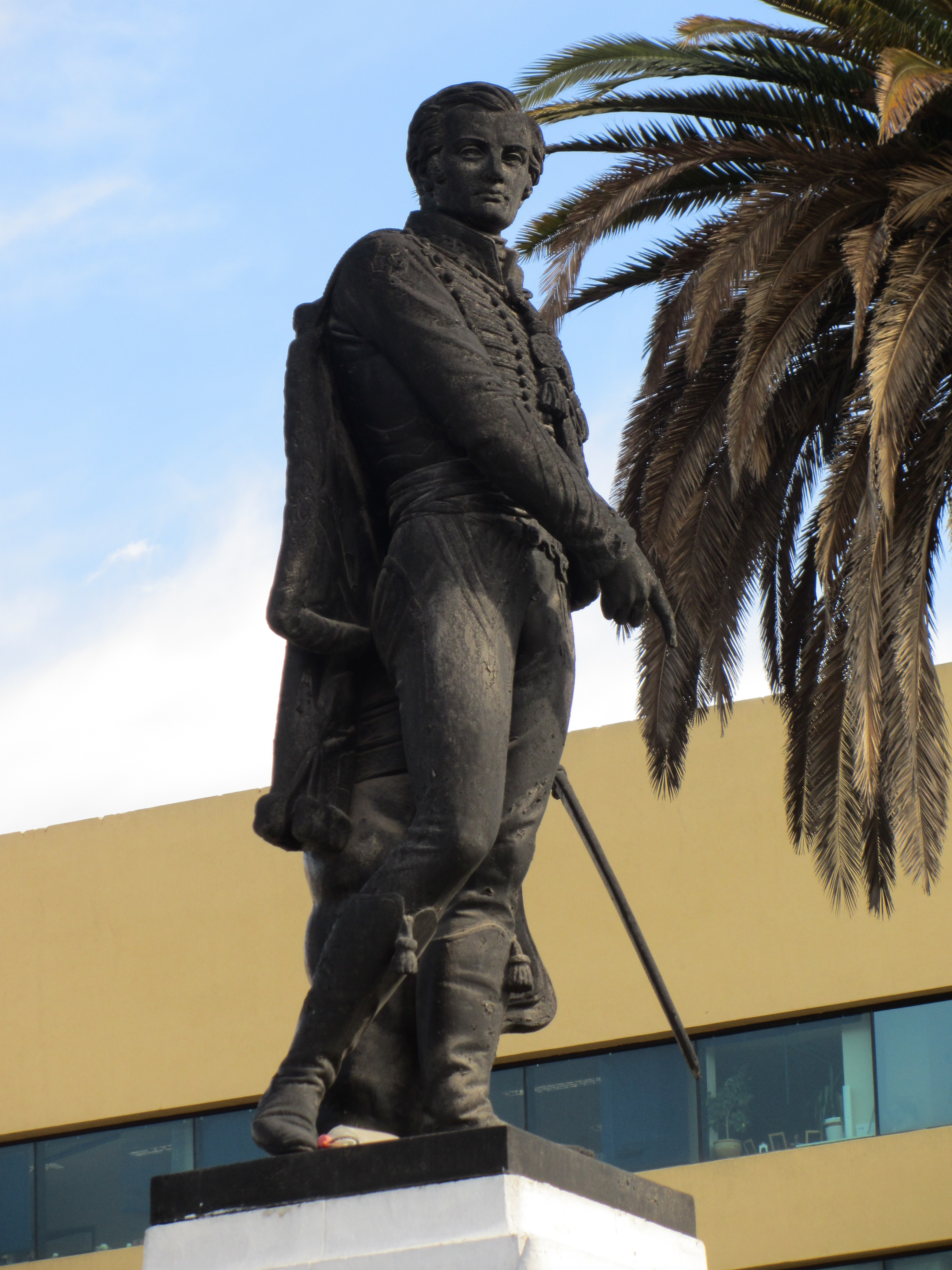 Estatua de José Miguel Carrera, obra del escultor francés Auguste Dumont